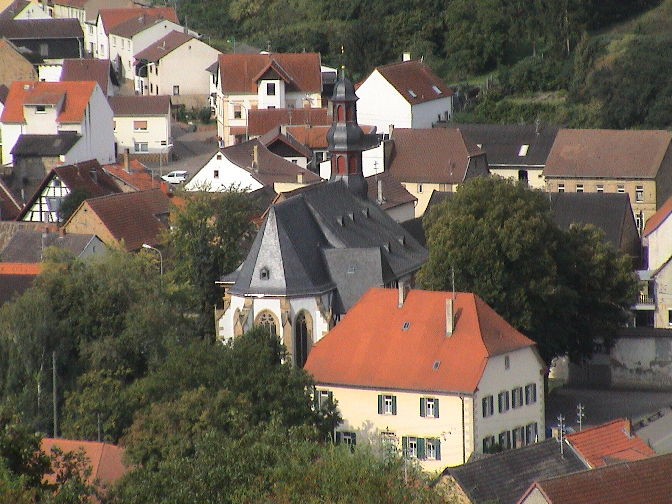 blick auf ortsmitte